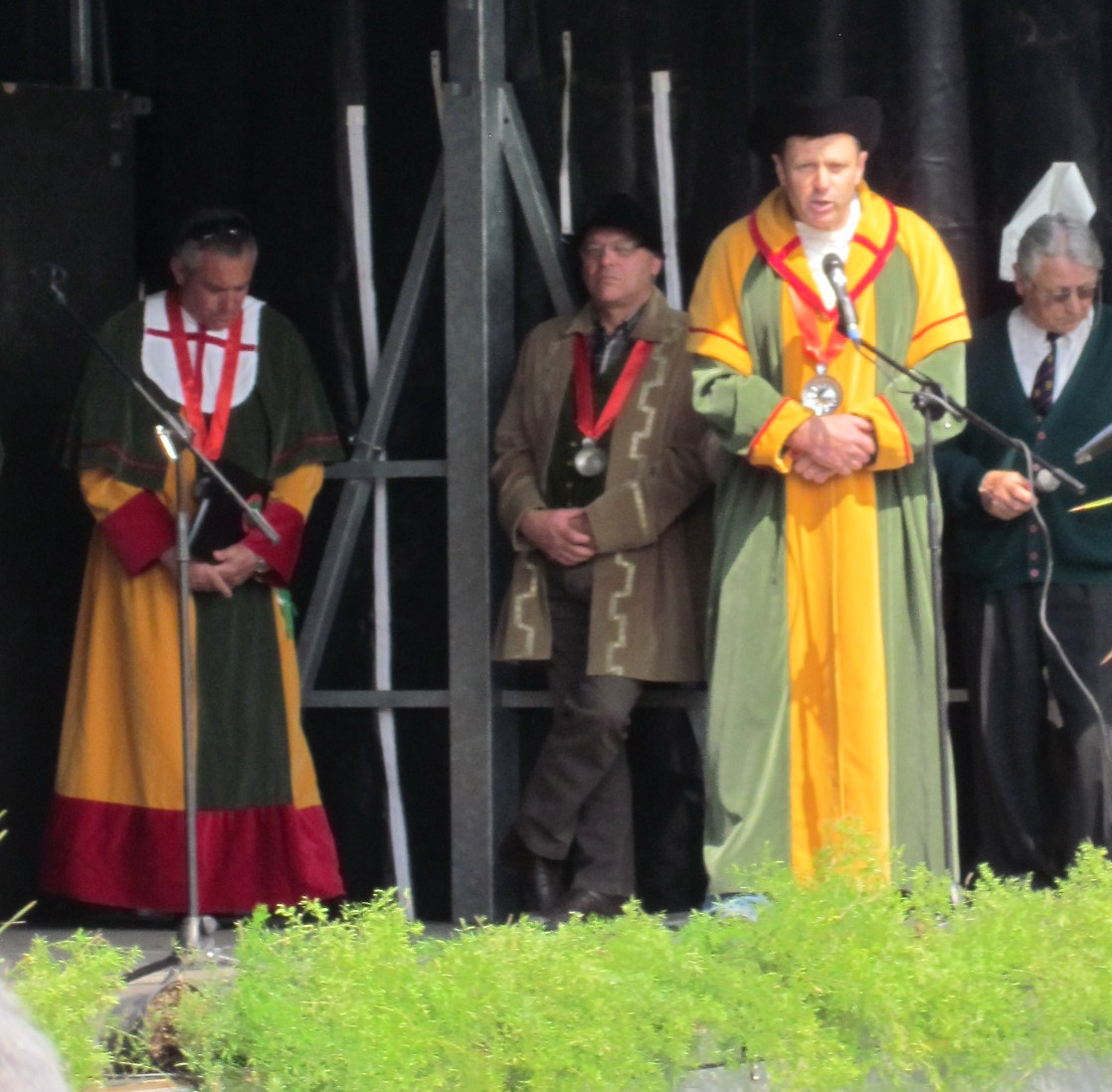 Des Échansons du vignoble de Reuilly, au cours de la cérémonie d'inauguration de la Foire au vin de 2011.